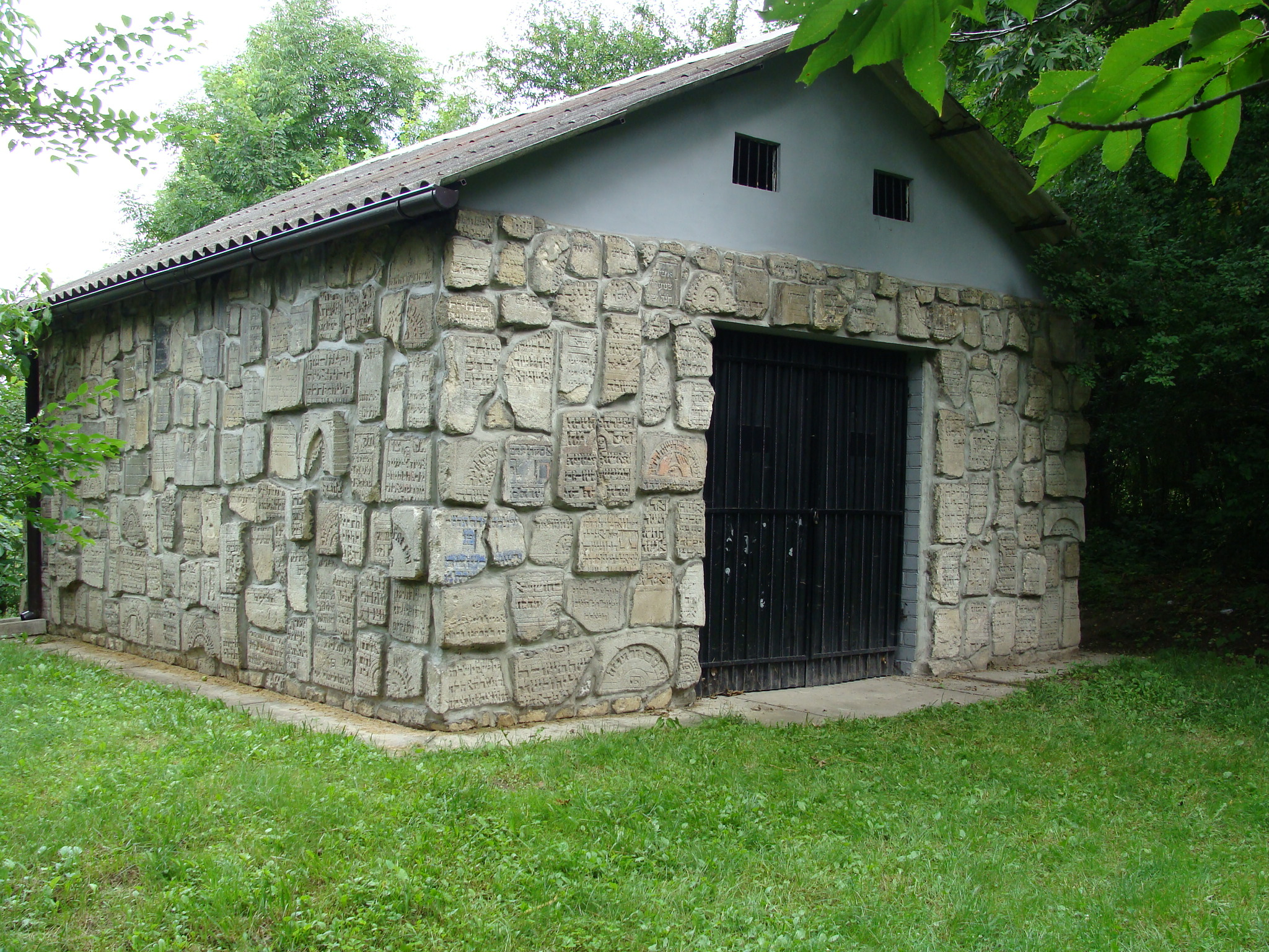 Kirkut w Izbicy